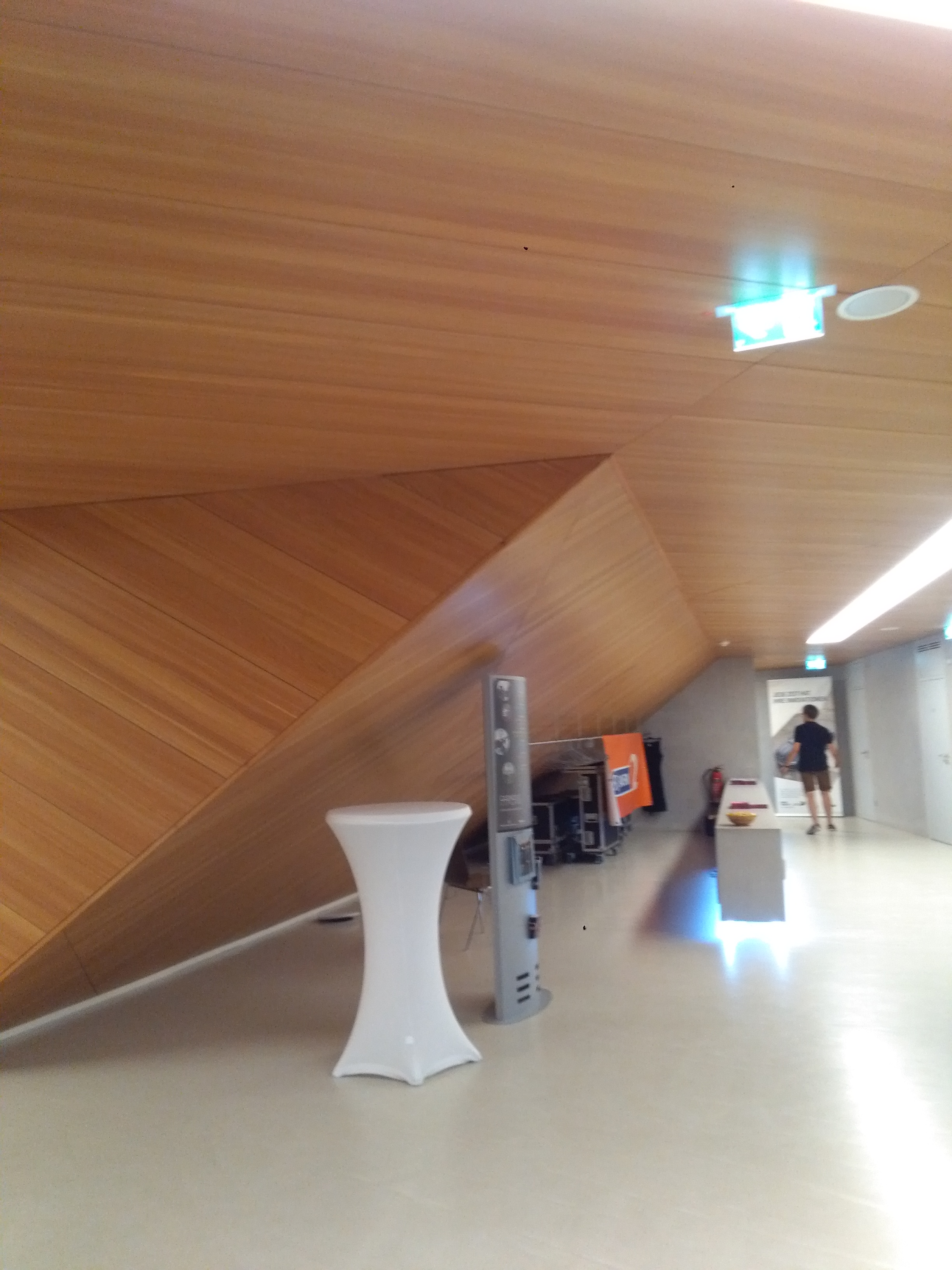 Konzerthaus Blaibach - Innenraum